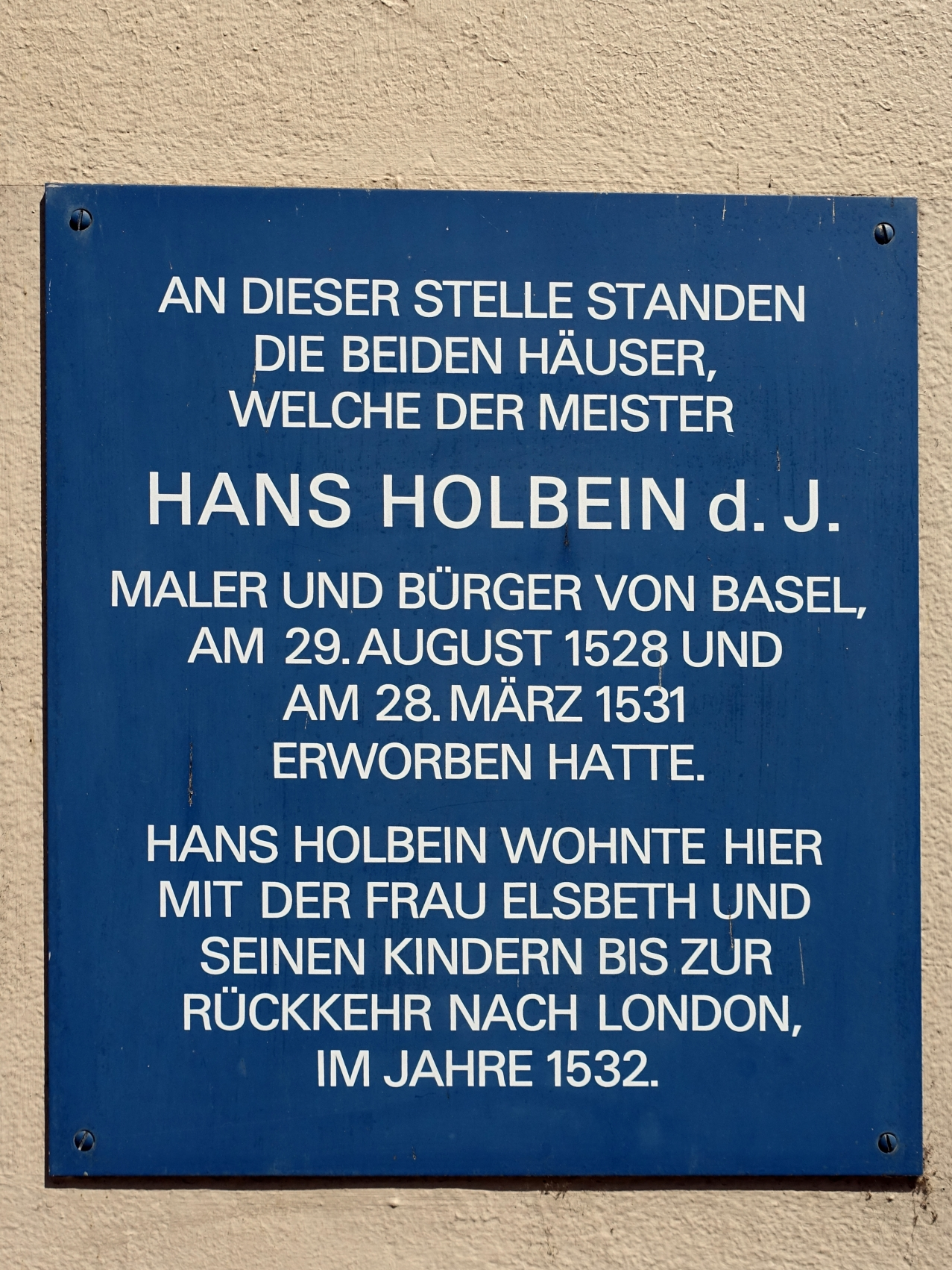 Wohnhaus 1528 und 1531 von Hans Holbein der Jüngere (1497–1543). St. Johanns-Vorstadt 22 in Basel